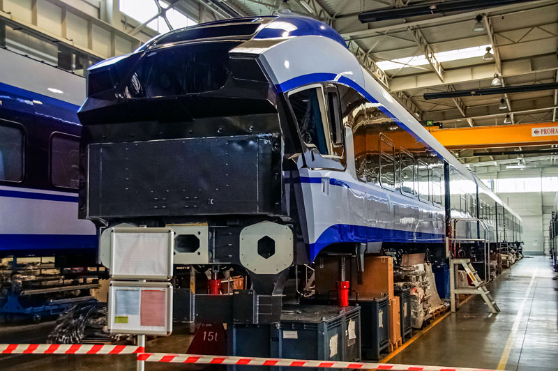 Elektryczny zespół trakcyjny Pesa Dart ED161-005 podczas montażu czoła w zakładach Pesa Bydgoszcz.